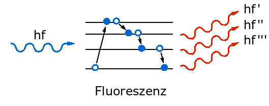 Fluoreszenz